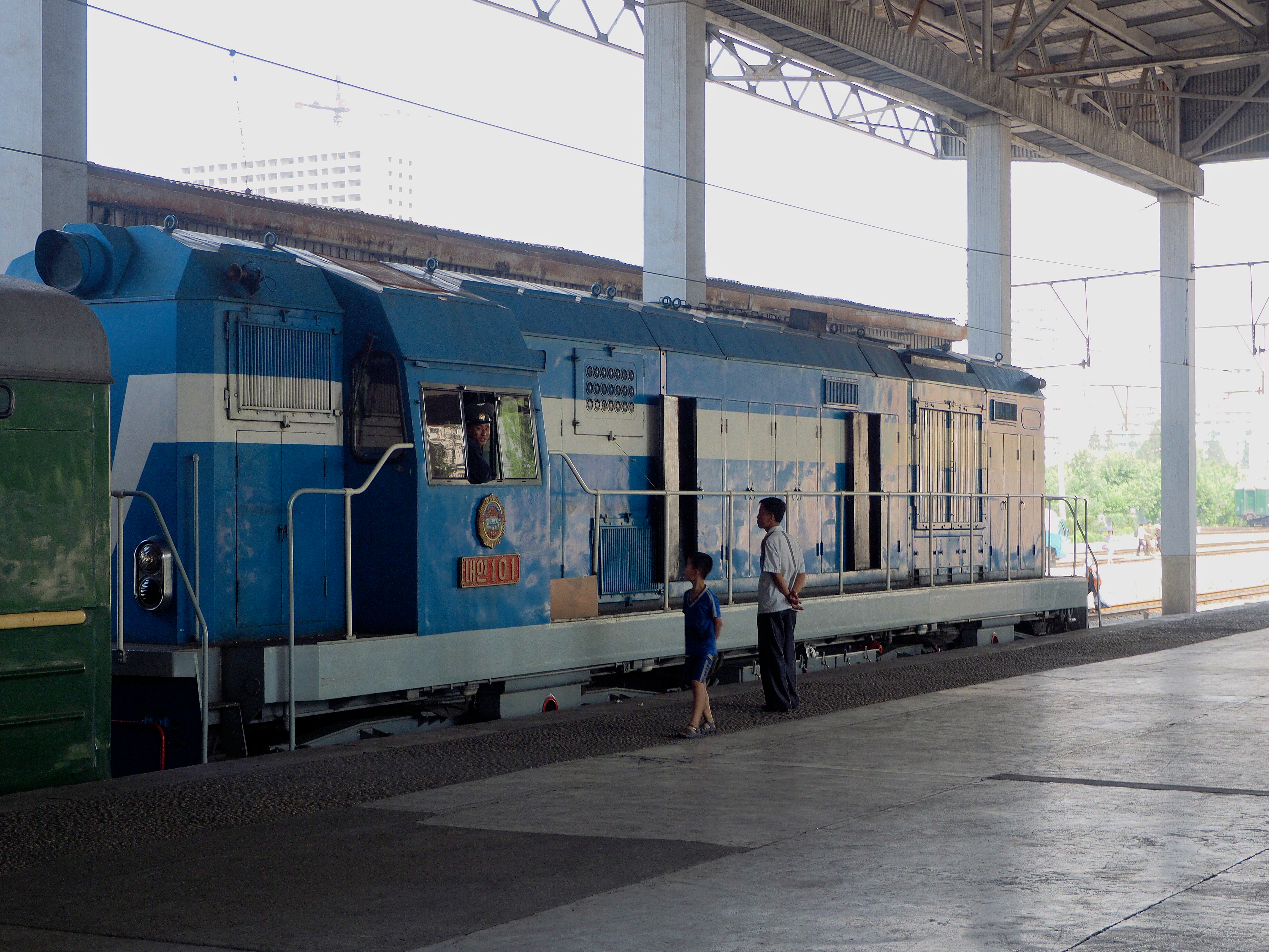 Korean State Railway DF5 switching at Pyongyang Station